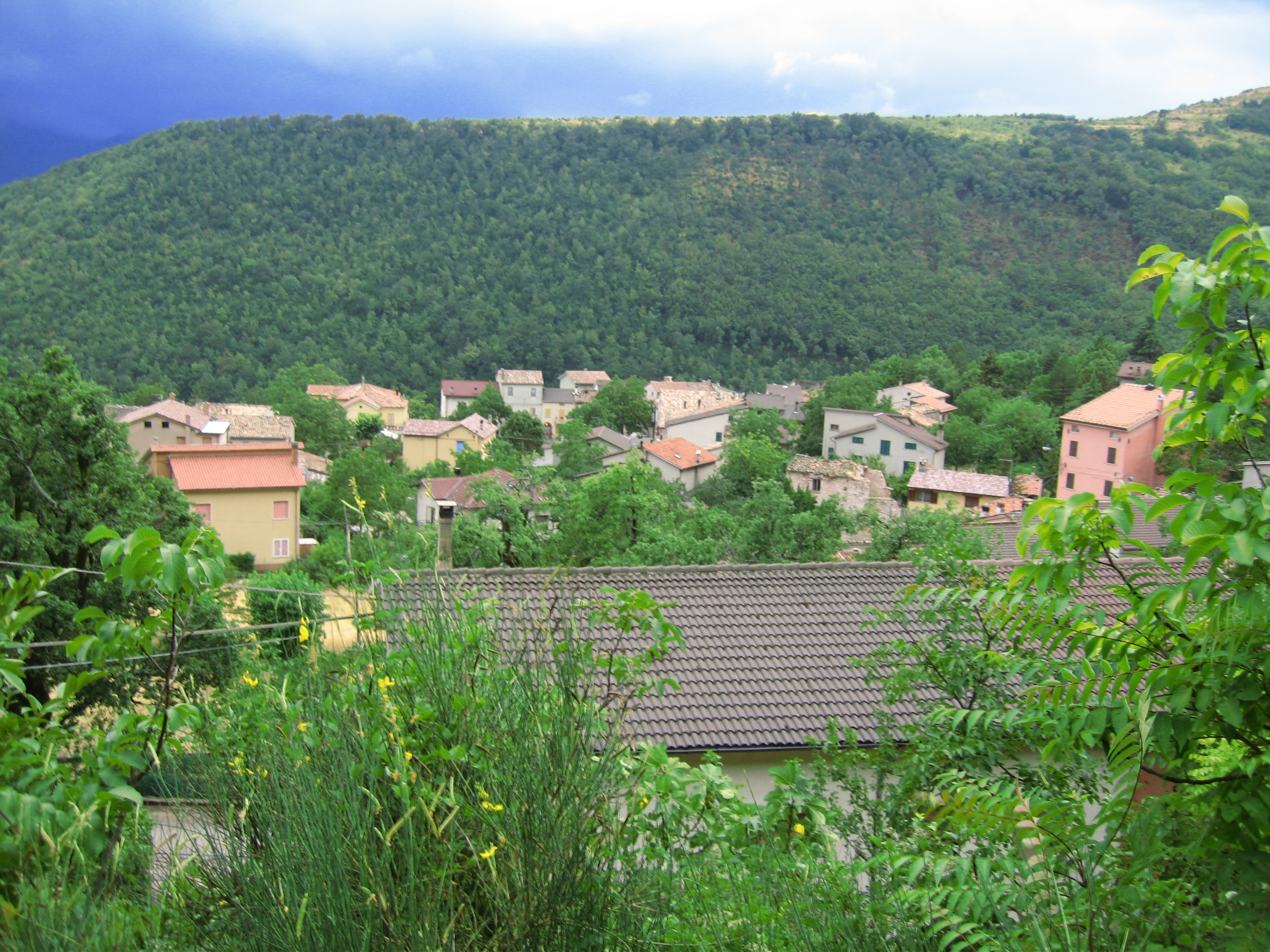 Montelago, frazione di Sassoferrato, il villaggio sul monte.